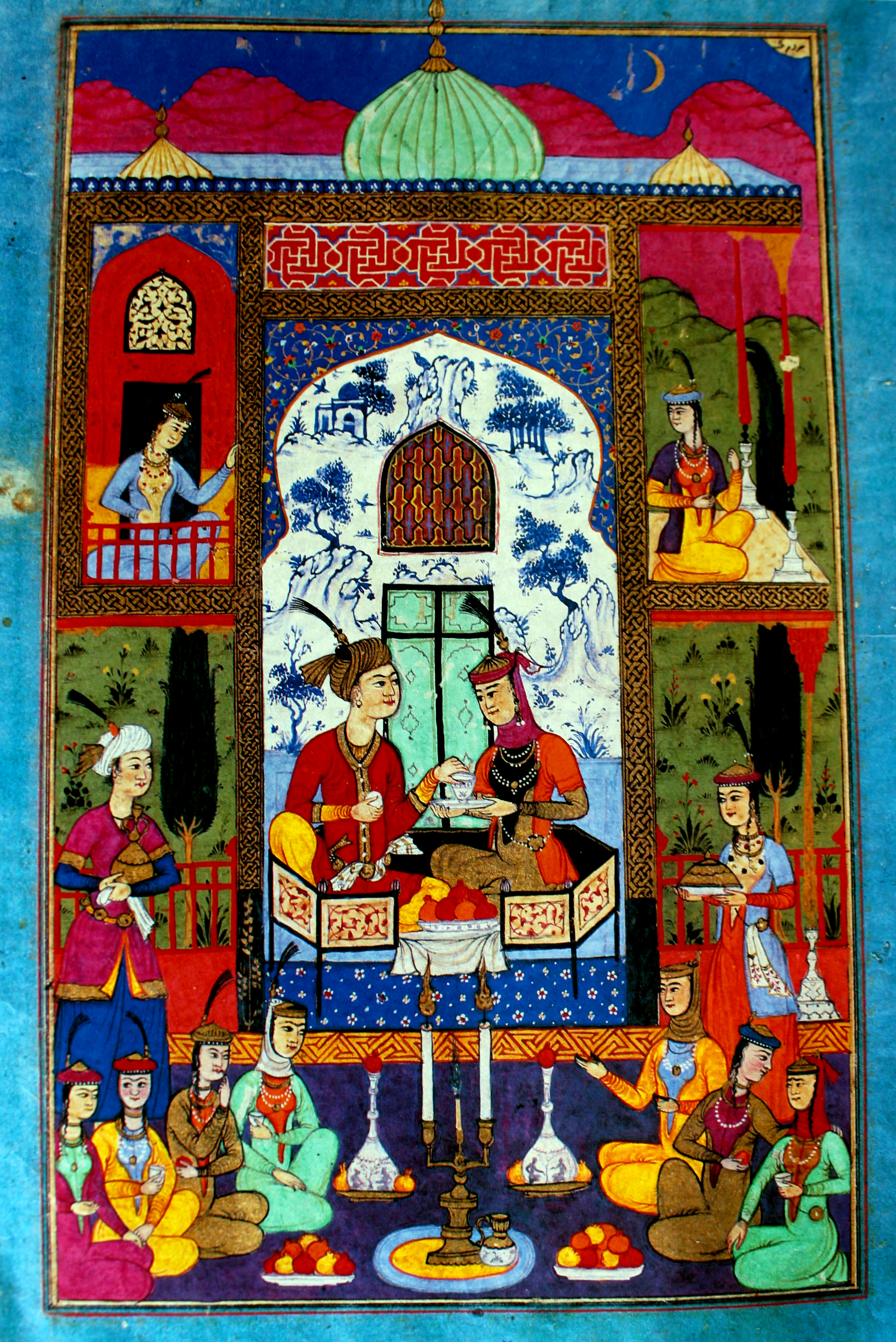 Xosrov və Şirin qızların söylədiyi əfsanələri dinləməsi, 1648, Buxara